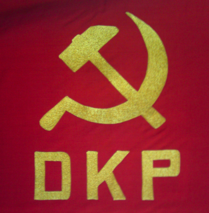 Danmarks Kommunistiske Partis fane. Taget den 8. marts 2010 til DKPs regionskonference i Ringsted.